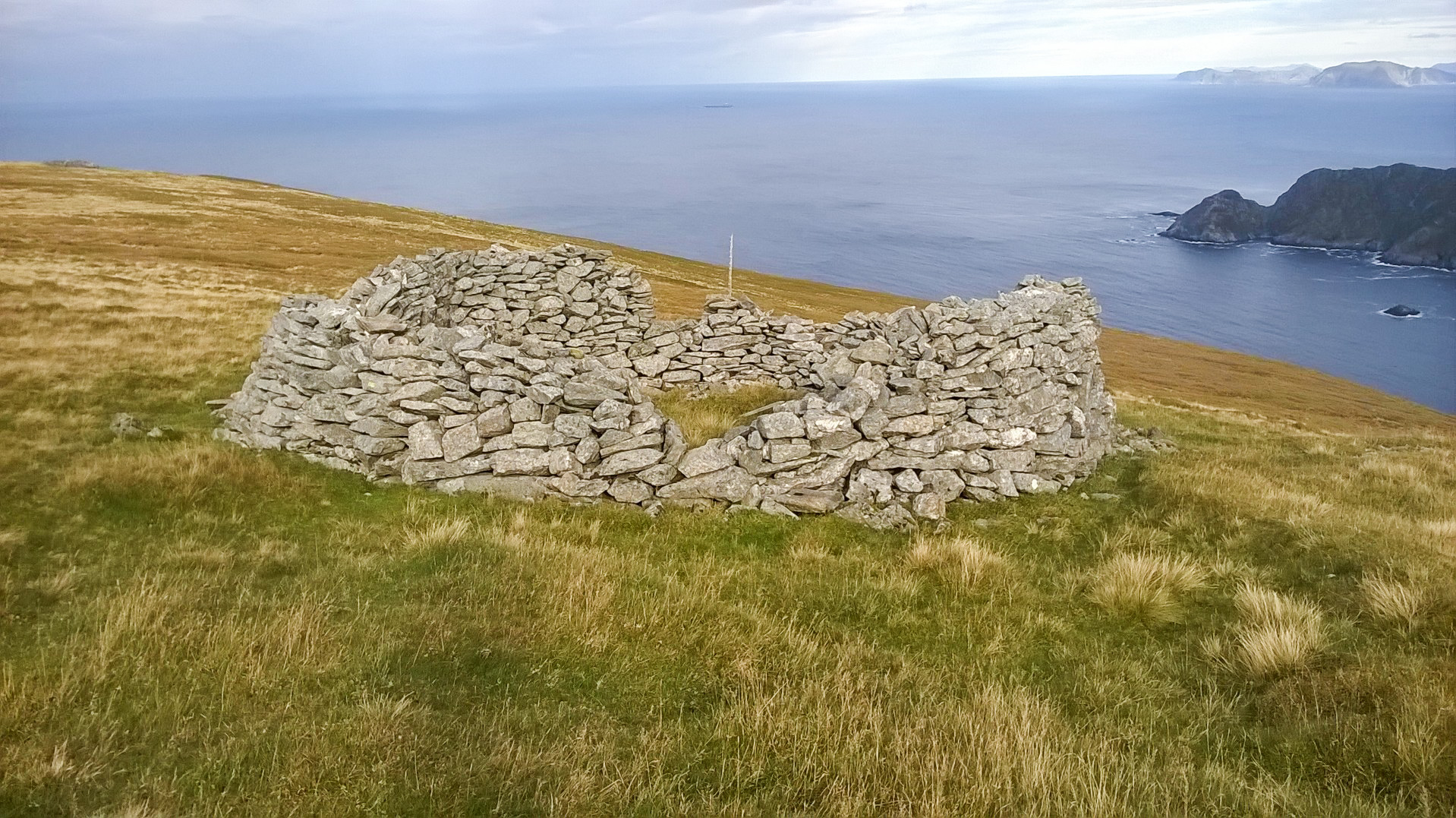 Restar av tysk forsvarsstilling på Stadtlandet. Delvis samanrasa tørrmur i lokal naturstein. Foto teke mot nordvest.